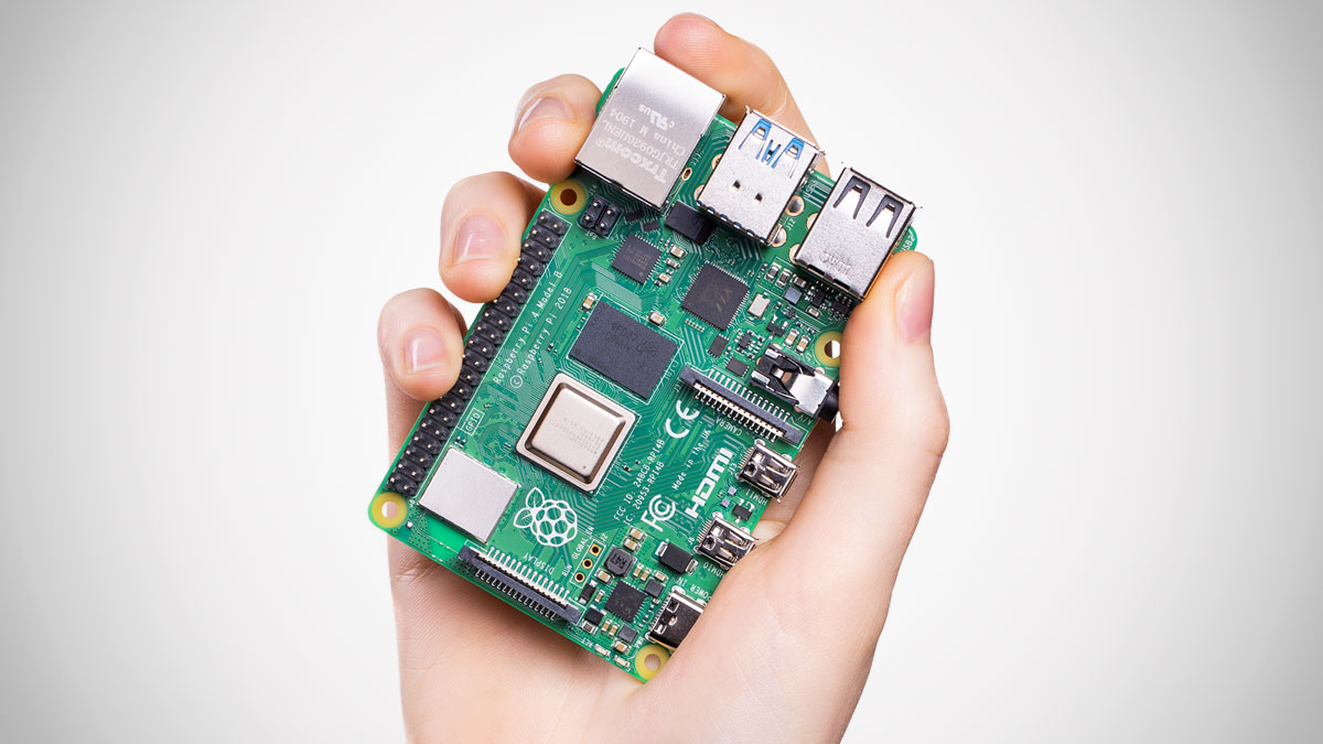 Самый известный в мире одноплатный мини-компьютер Raspberry Pi